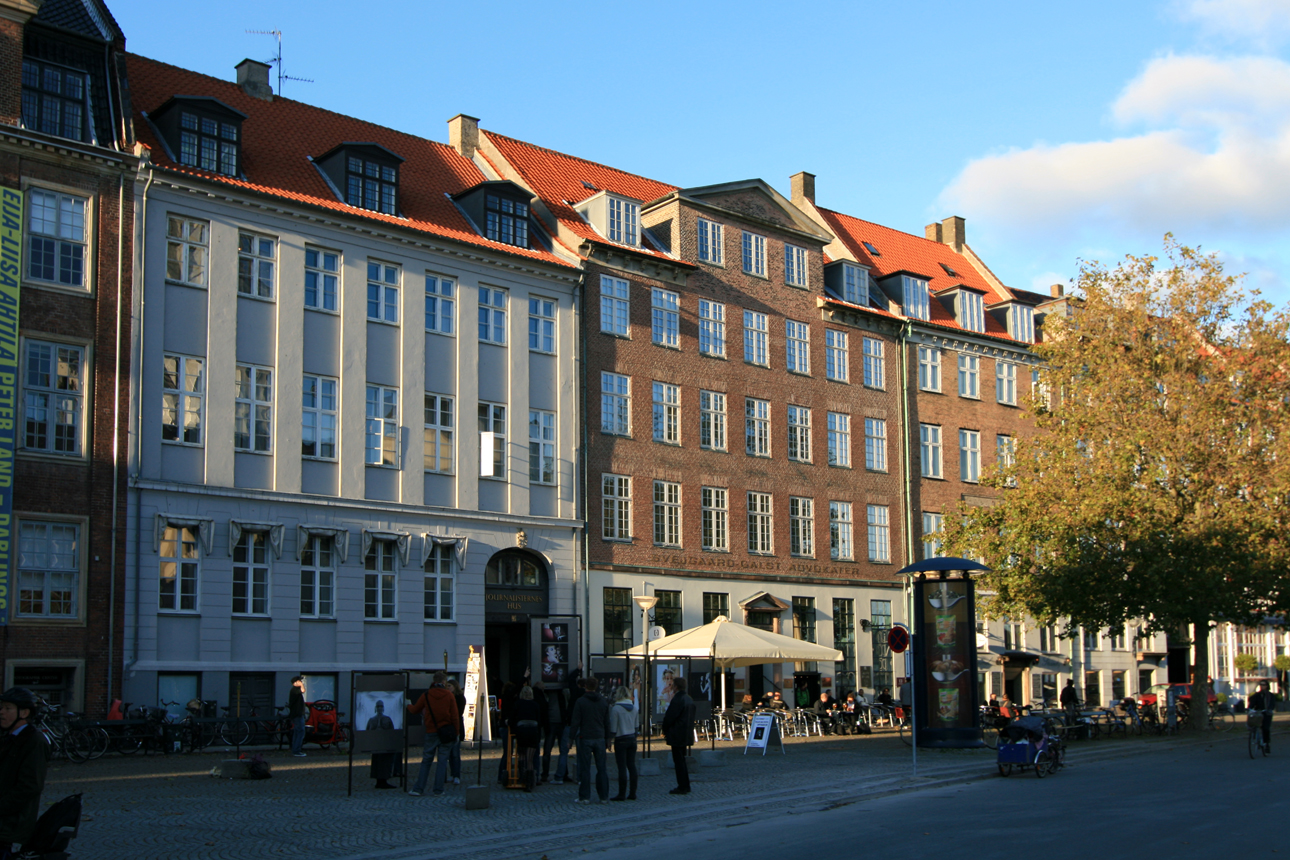 Parti fra Gammel Strand, København.